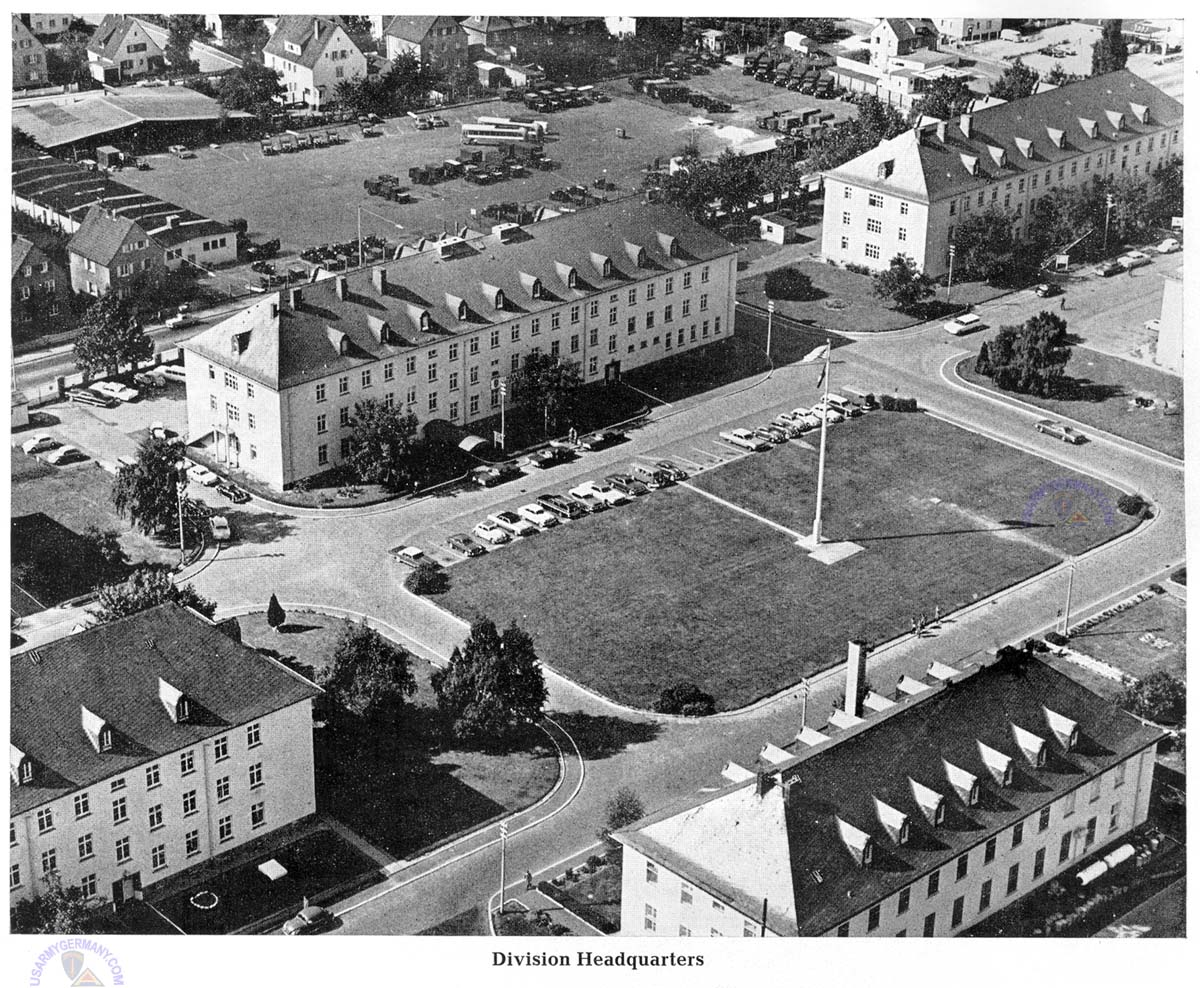 Des Gouttes Kaserne / Rose Barracks-Kaserne, Bad Kreuznach wurden vormals vom Nazi-Regime in den 1930er Jahren als "Hindenburg-Kaserne" der Wehrmacht gebaut und nach dem Zweiten Weltkrieg von der U.S. Army übernommen und in Rose Barracks-Kaserne umbenannt. Nach dem Auszug der US-Army entsteht hier der Gewerbepark General Rose in Bad Kreuznach